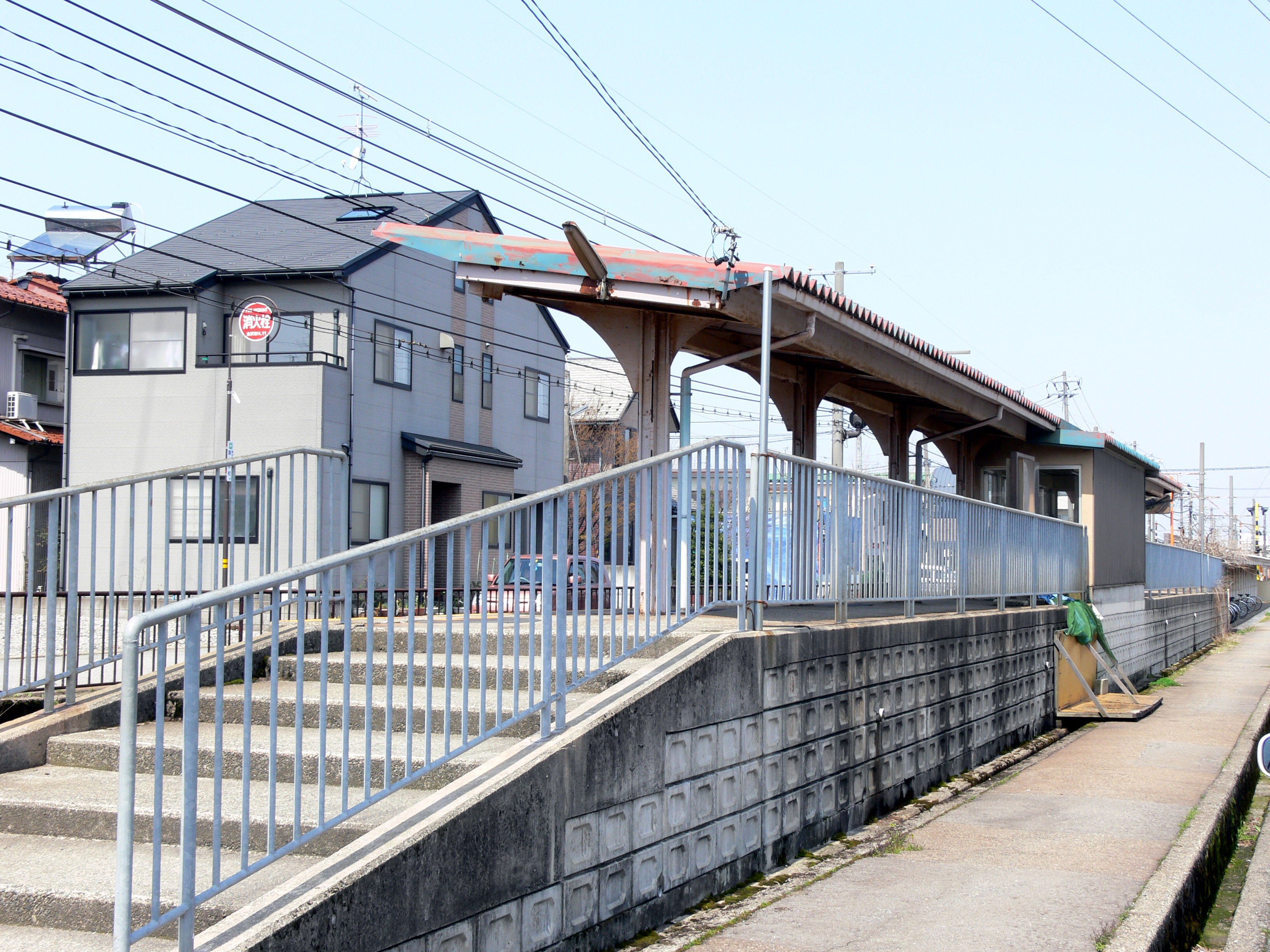 乙丸駅